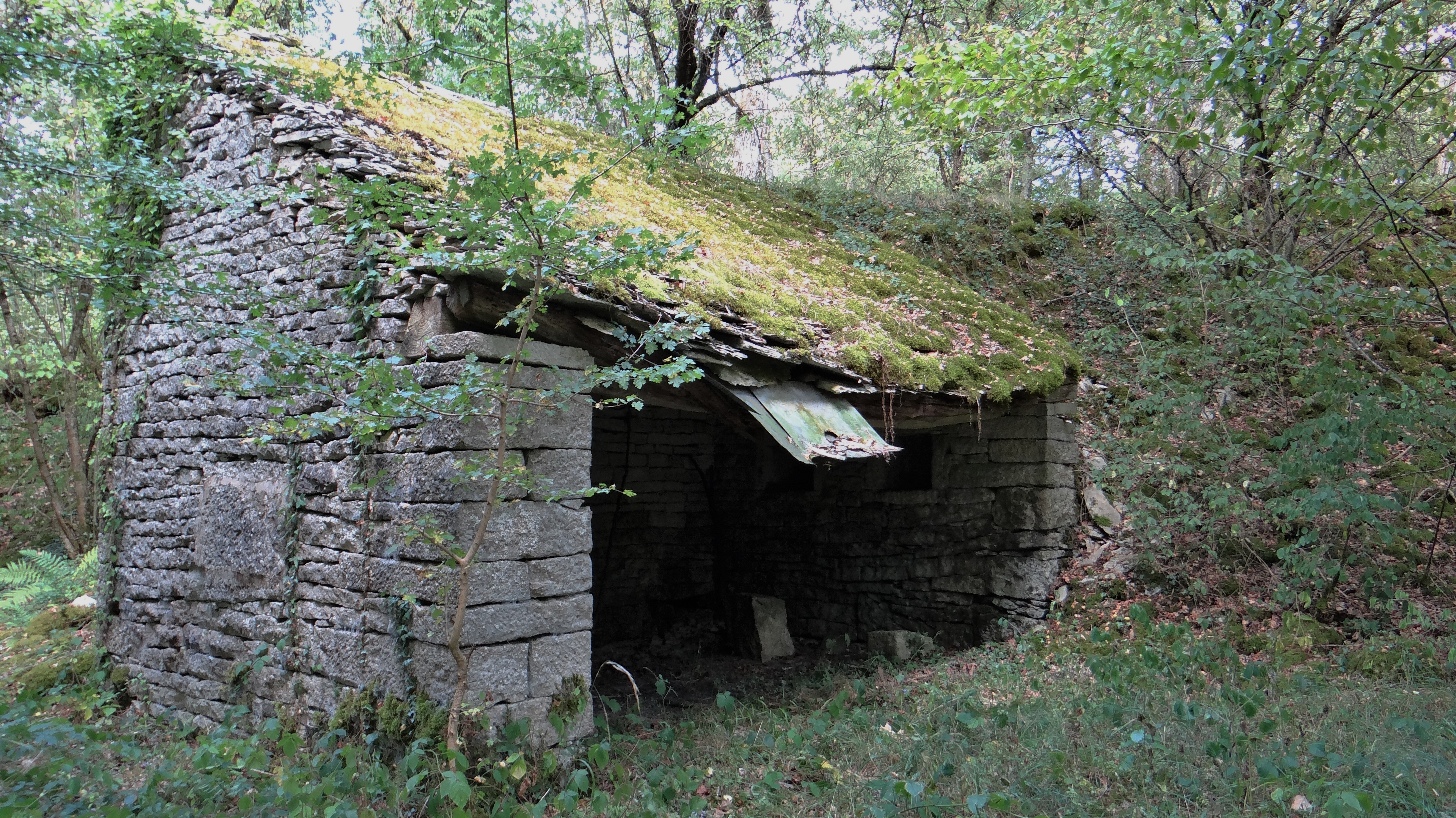 Abri de carrier dans les bois d'Annoux, route de Thizy